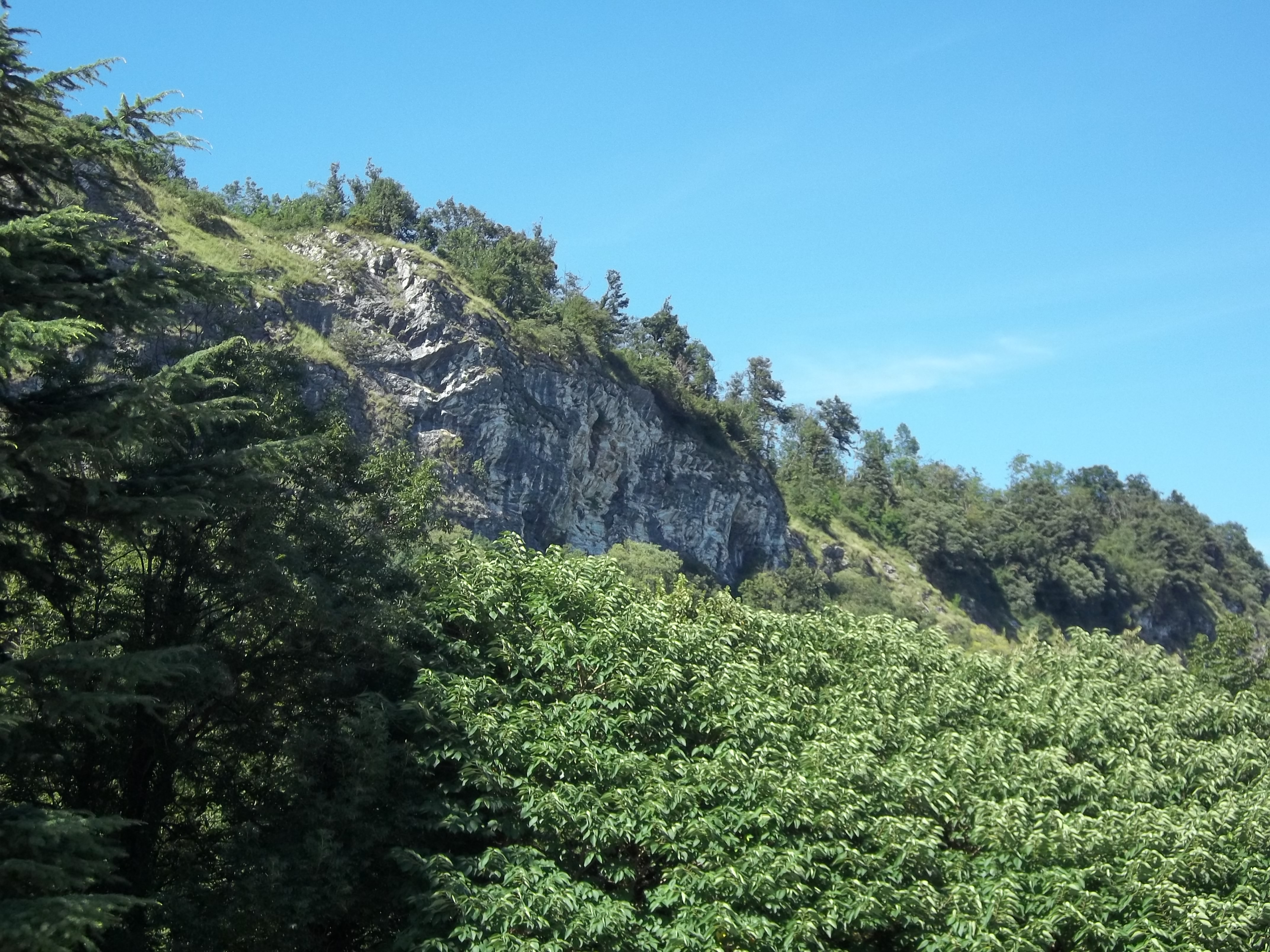 Interlingua: Sasso Poiano